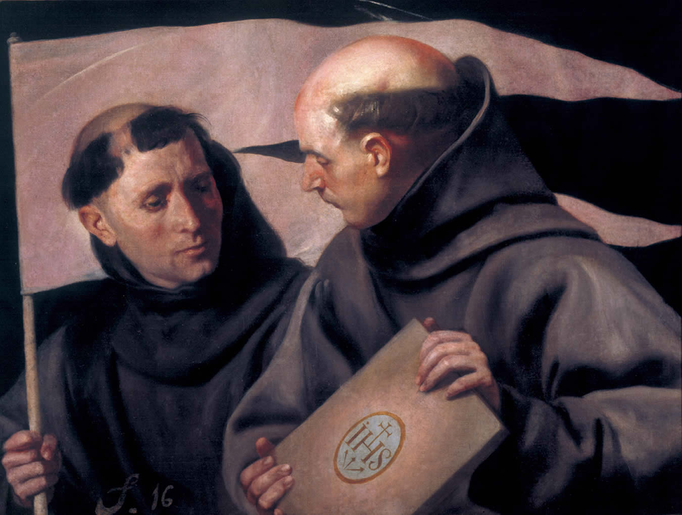 La obra representa a San Bernardino de Siena junto a San Juan de Capistrano.